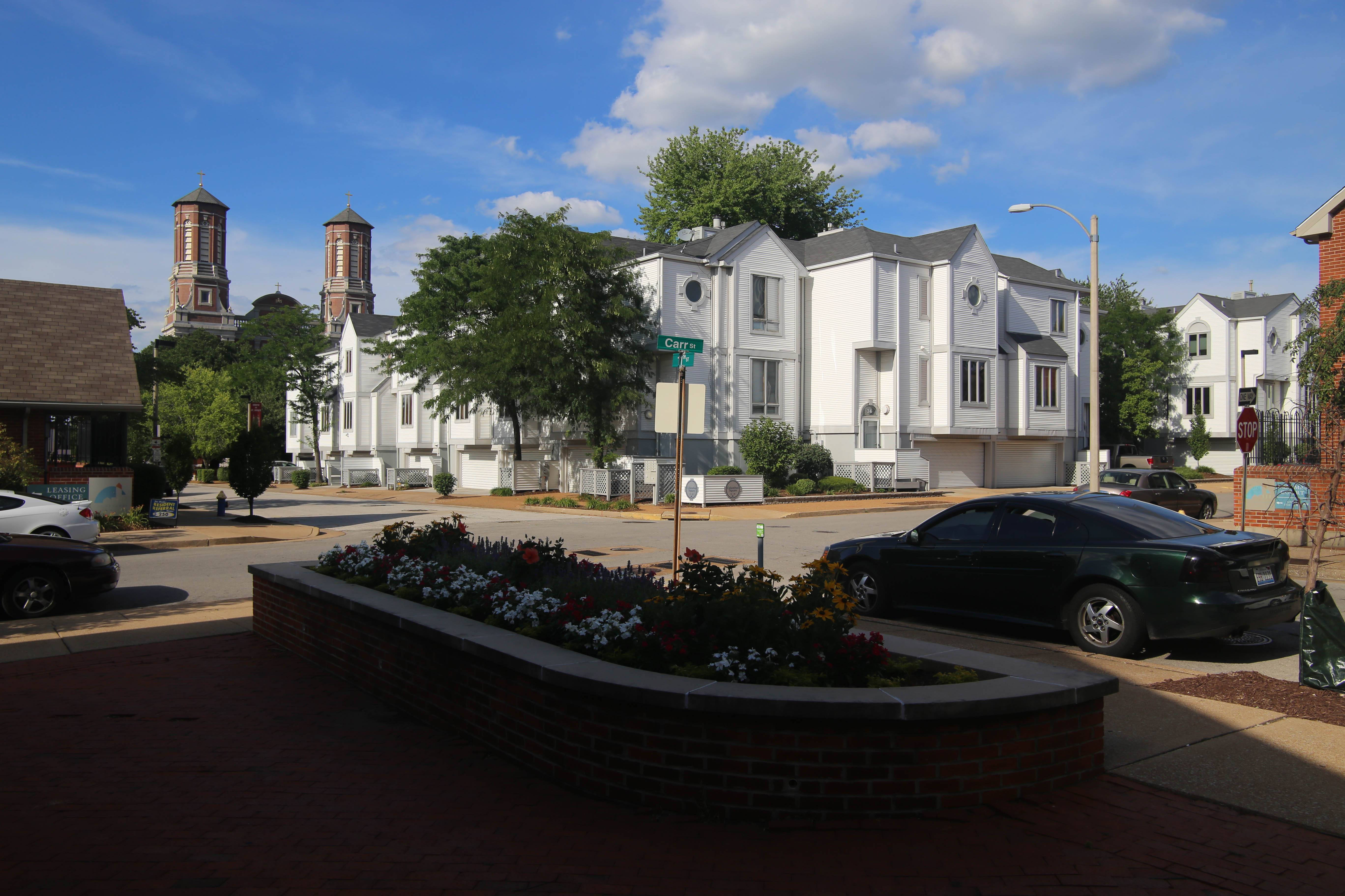 Columbus Square